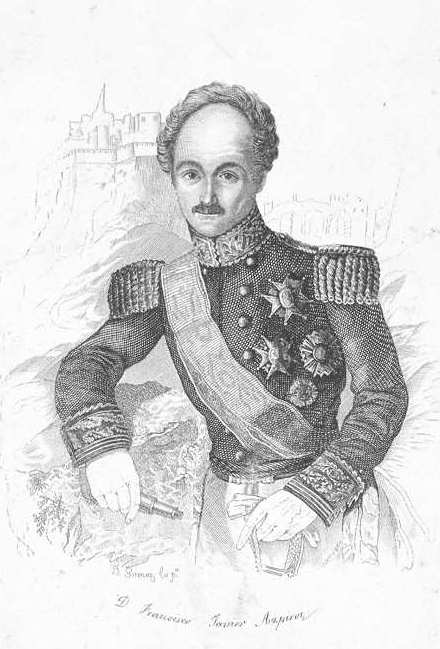 Francisco Javier de Azpiroz, grabado calcográfico de José Gómez. Biblioteca Nacional de España